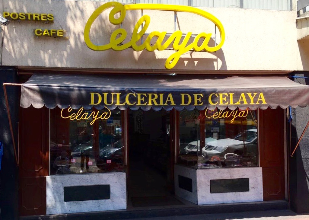 Dulcería de Celaya ubicada en la colonia Roma.